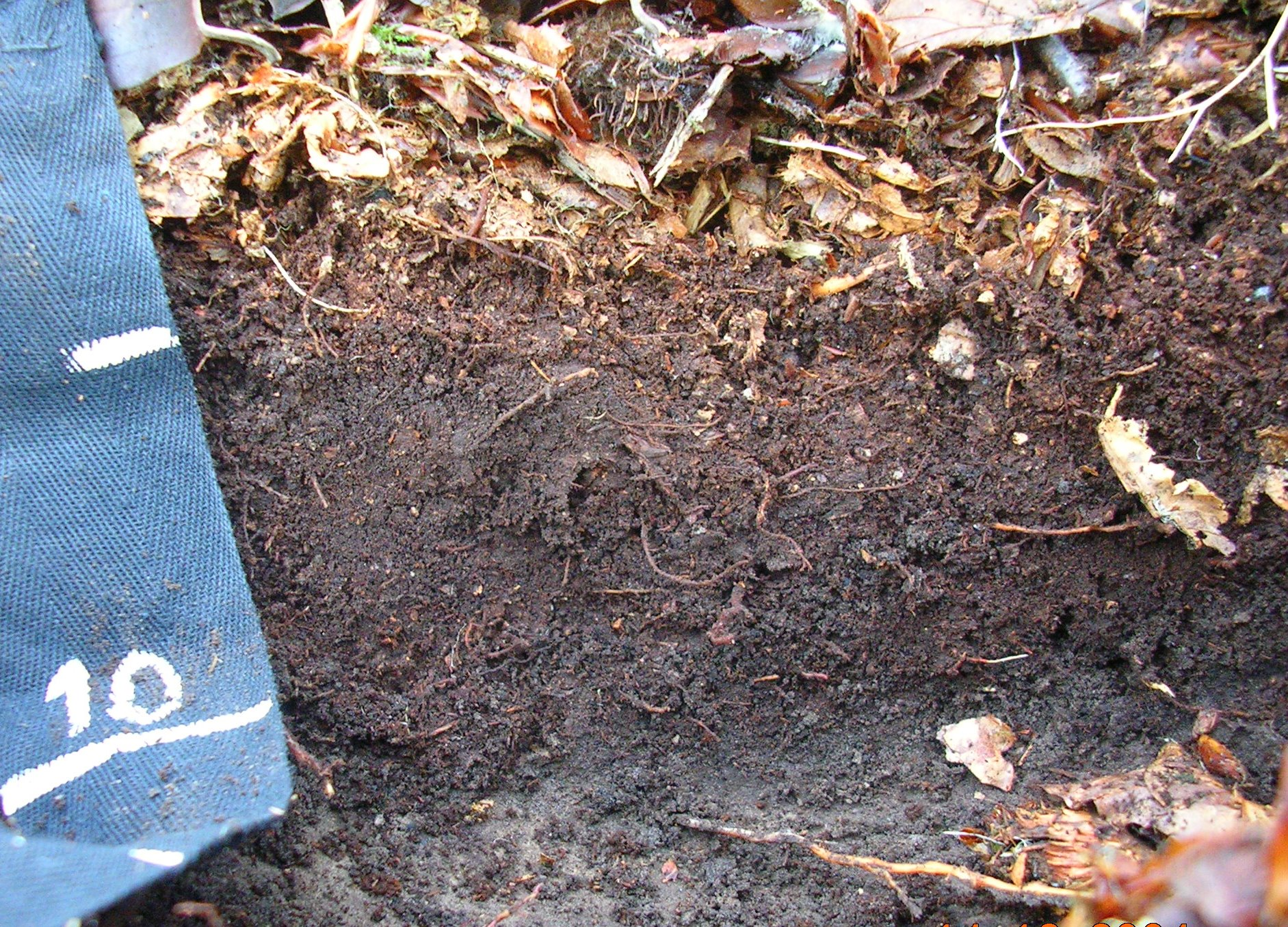 Humus forestiers en Forêt de Fougères